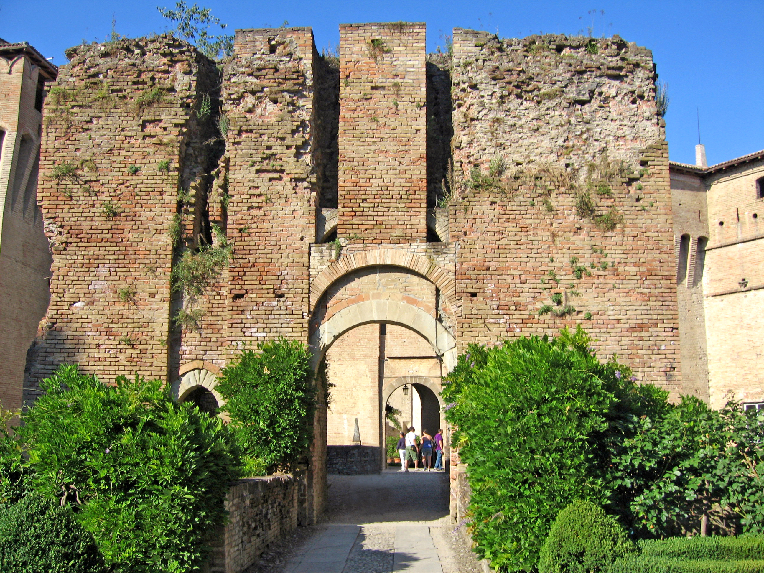 Castello di Montechiarugolo (rivellino d'ingresso)